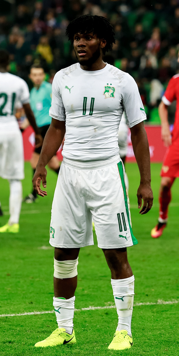 Россия – Кот-д'Ивуар